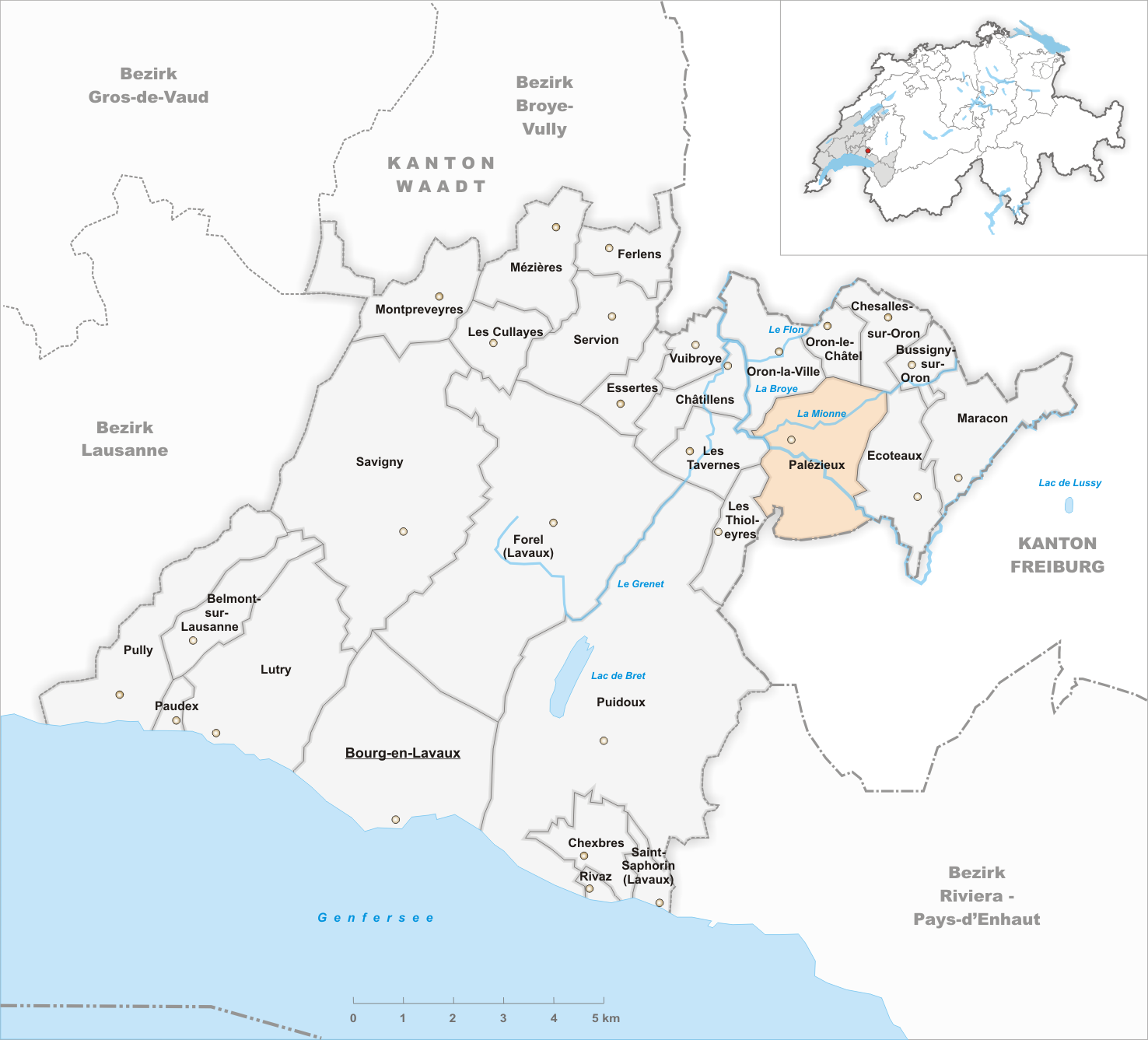 Municipality Palézieux